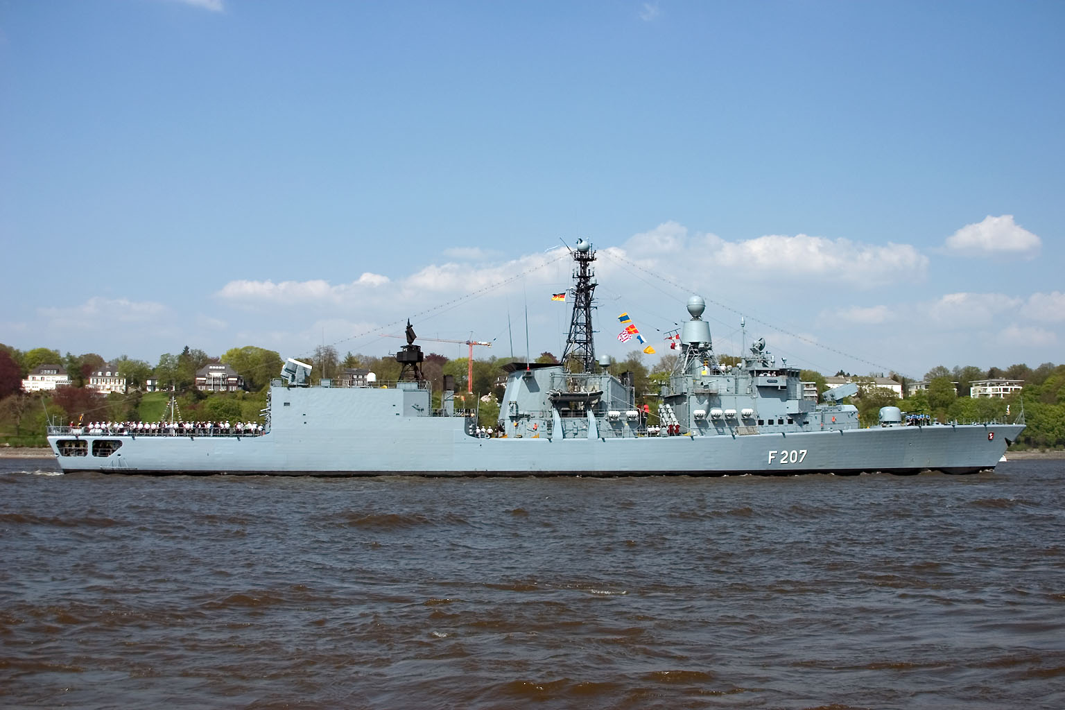 Fregatte „Bremen“ (F 207) der Deutschen Marine. Das Schiff ist Typschiff der F122-Klasse.